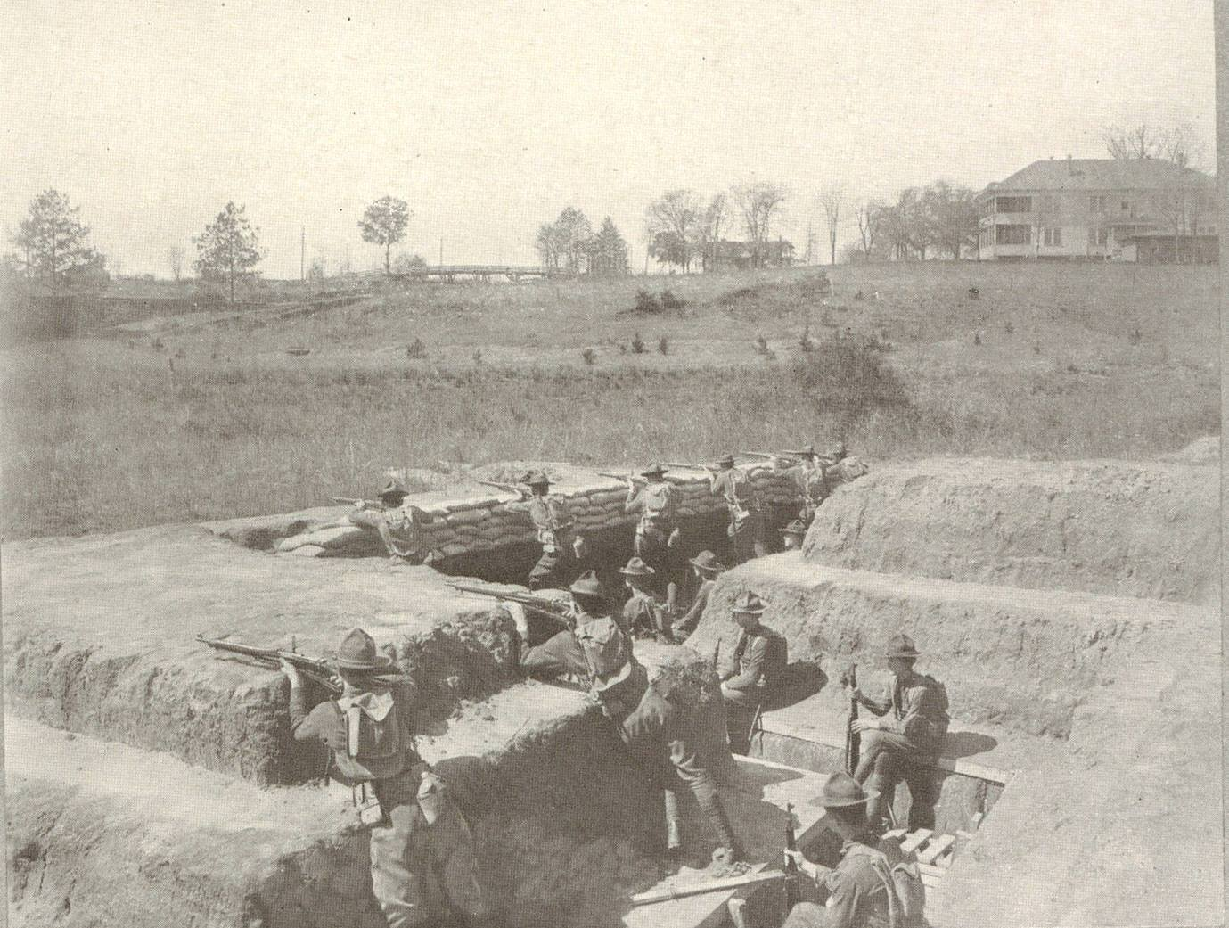 马里昂军事学院学院进行步枪射击训练